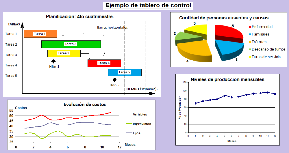 Ejemplo de inficadores que forman un tablero de control.